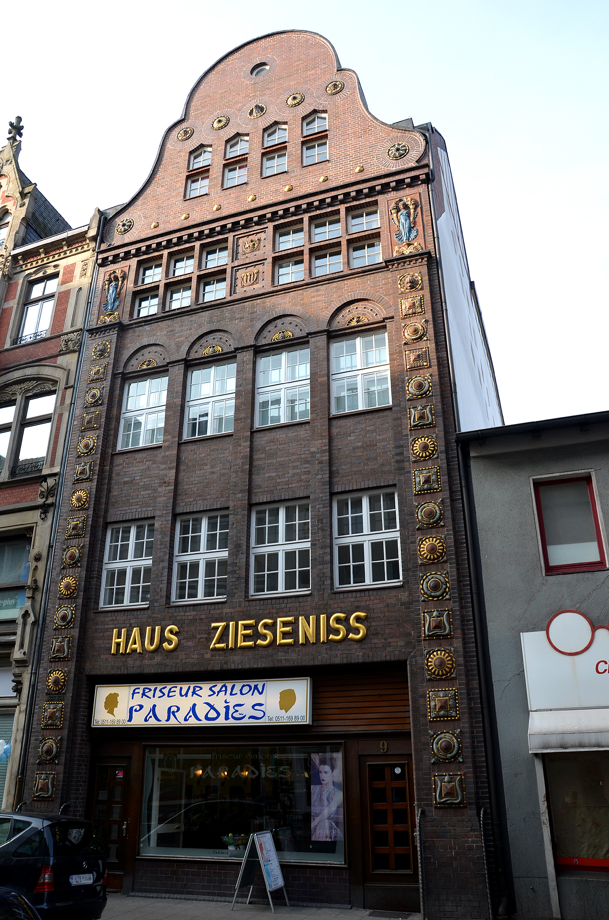 Das 1913 bis 1914 von dem Architekten Georg Stern erbaute Haus Zieseniss unter der (heutigen) Adresse Steintorstraße 9 am Rande der Altstadt von Hannover gilt als das zweitälteste erhaltene Gebäude vom Typ "Geschäftshaus" in Hannover. Der für den Bauherrn und Fischhändler Zieseniss errichtete Gebäudekomplex, der sich rückwärtig bis zur Reitwallstraße 5 fortsetzt, steht in der Nachfolge frühneuzeitlicher Kaufmannshäuser. Das Geschäftshaus wurde Heimatstil erbaut und zeigt insbesondere an seiner Hauptfassade vielfältige teils bunt lasierte Terrakotten mit Darstellungen insbesondere essbarer Meerestiere ...